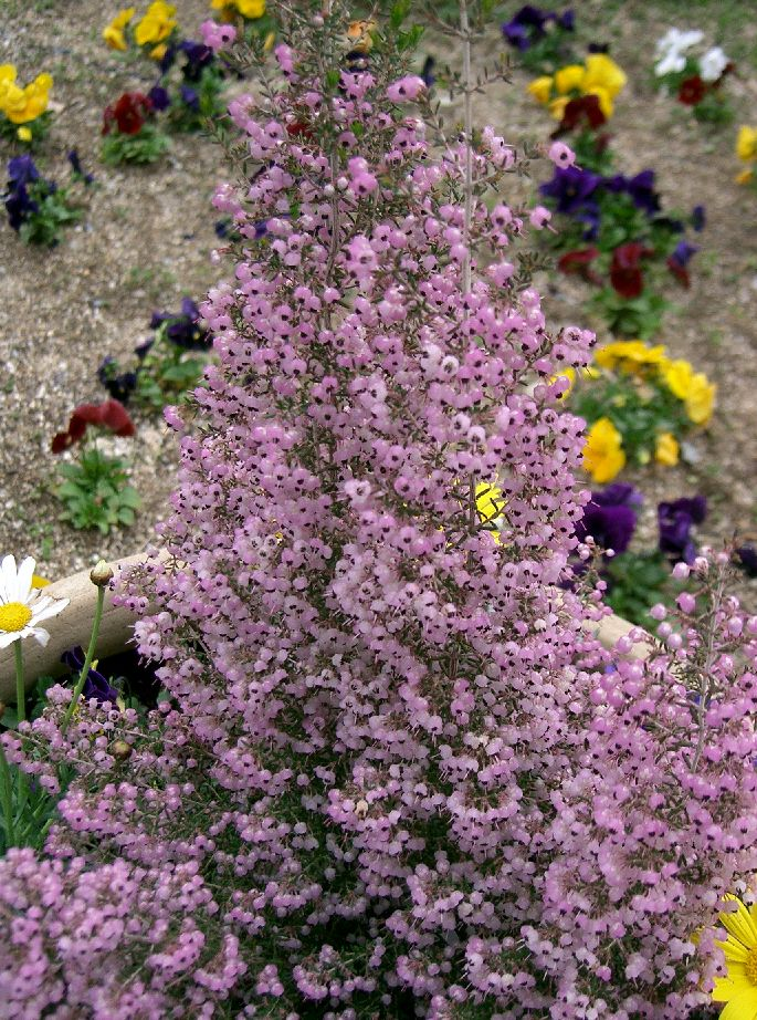 Erica canaliculata